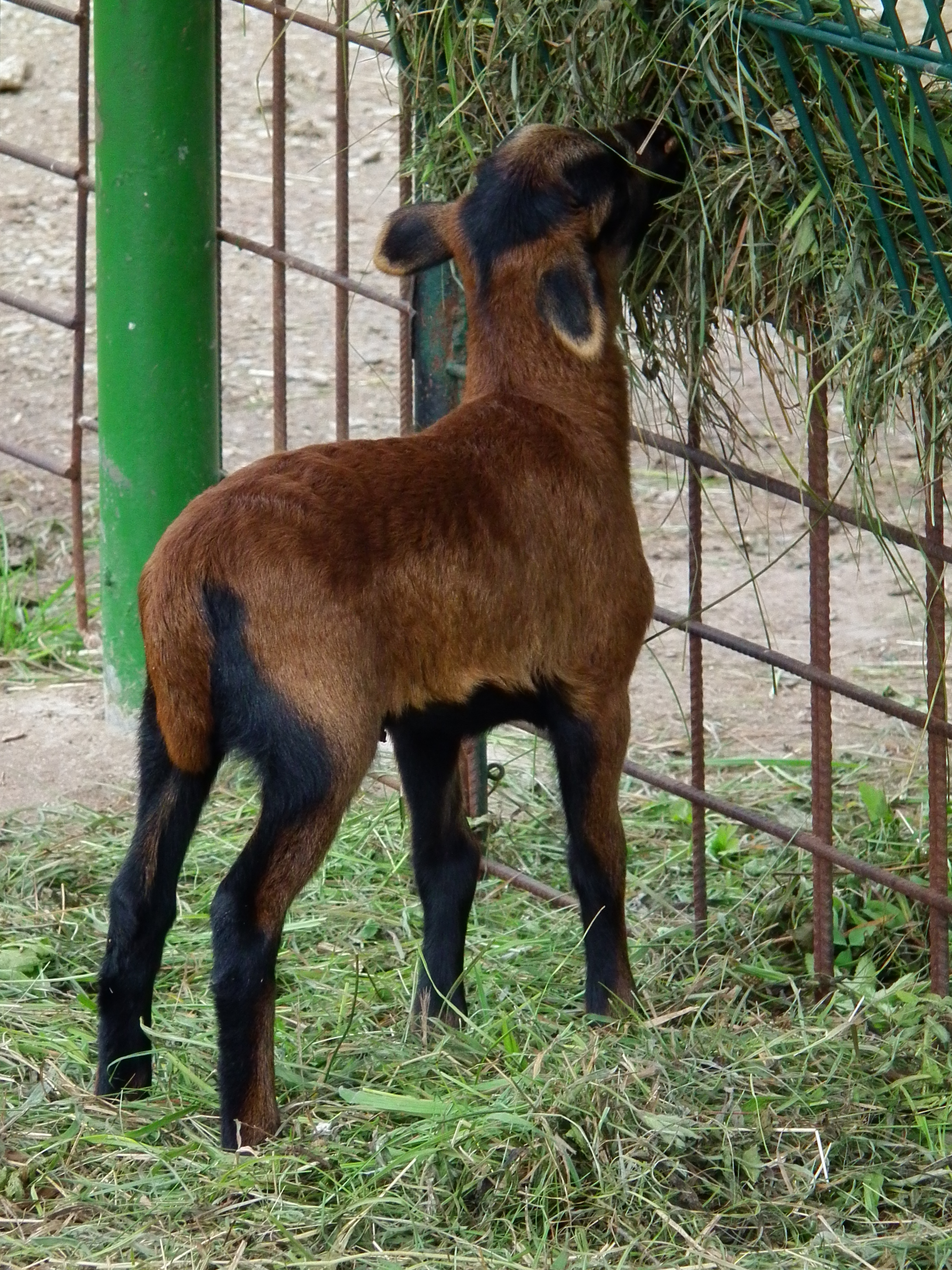 Kamerunschaf, hier ein Heu knabberndes Lamm im Kleintierpark Bad Schönborn (Baden-Württemberg, Deutschland)